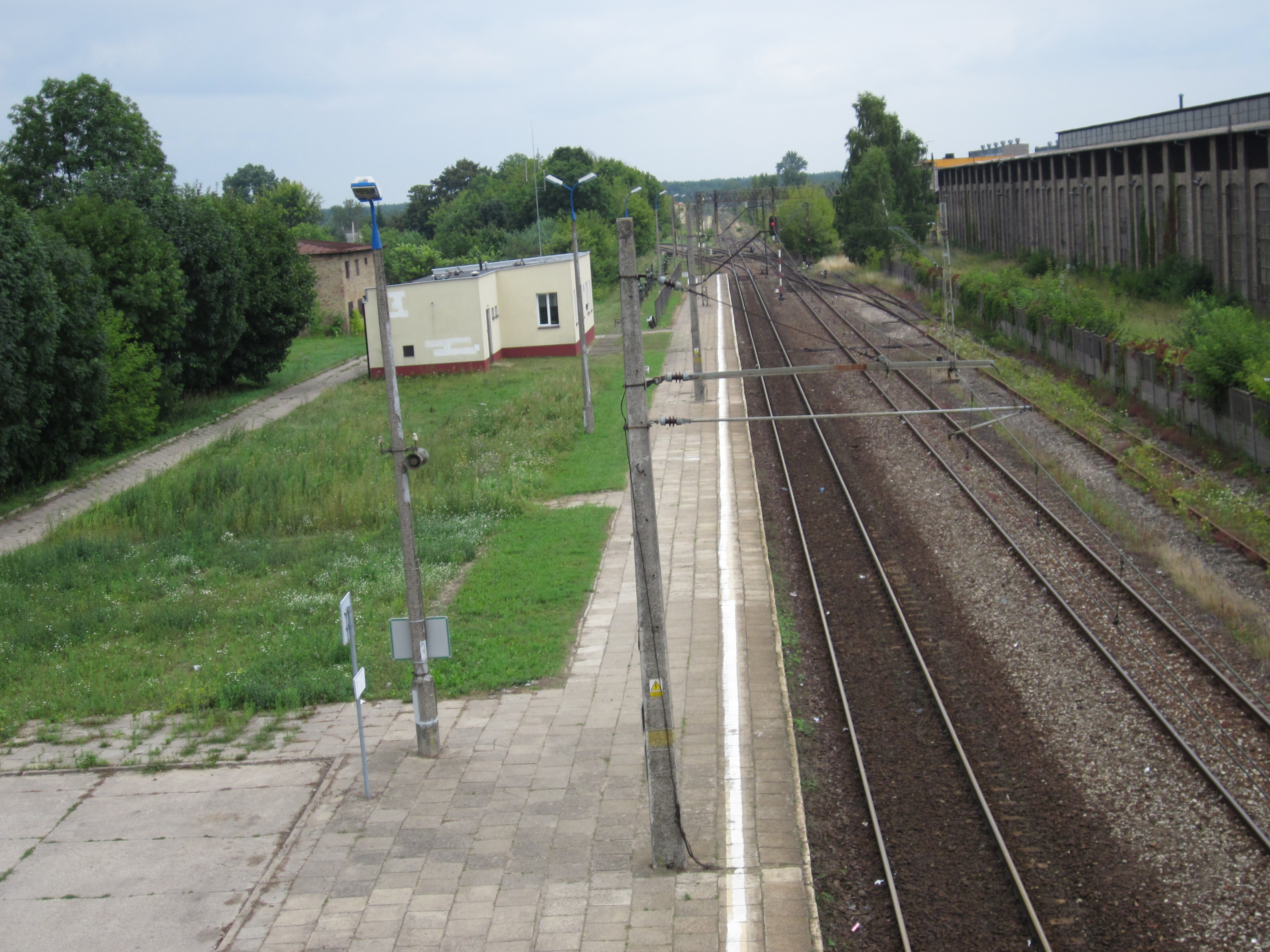 Stacja kolejowa Białystok - Starosielce (widok z kładki)